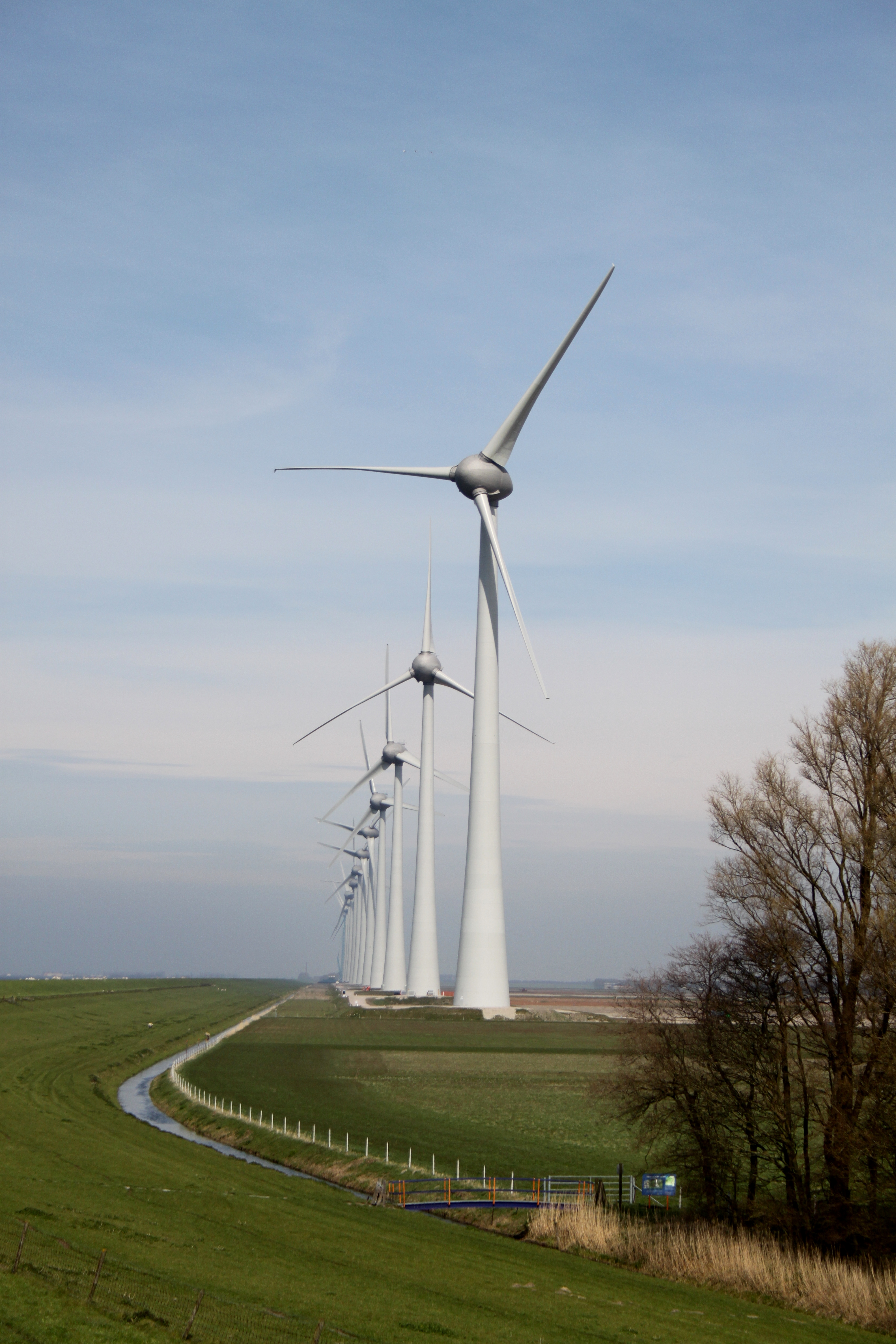 Noordoostpolder-windmolenpark Westermeerdijk 2015